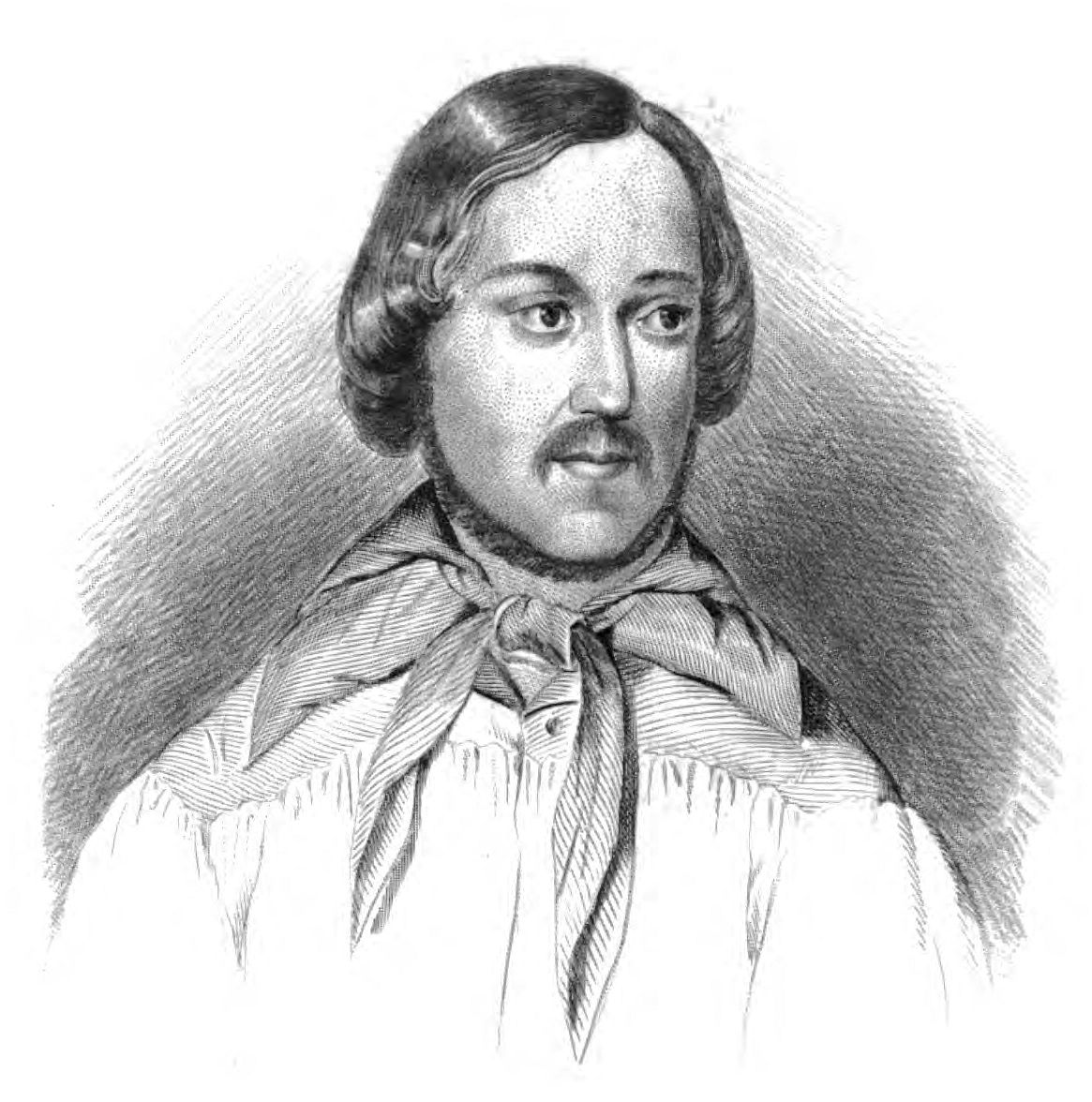 Carlo Bini